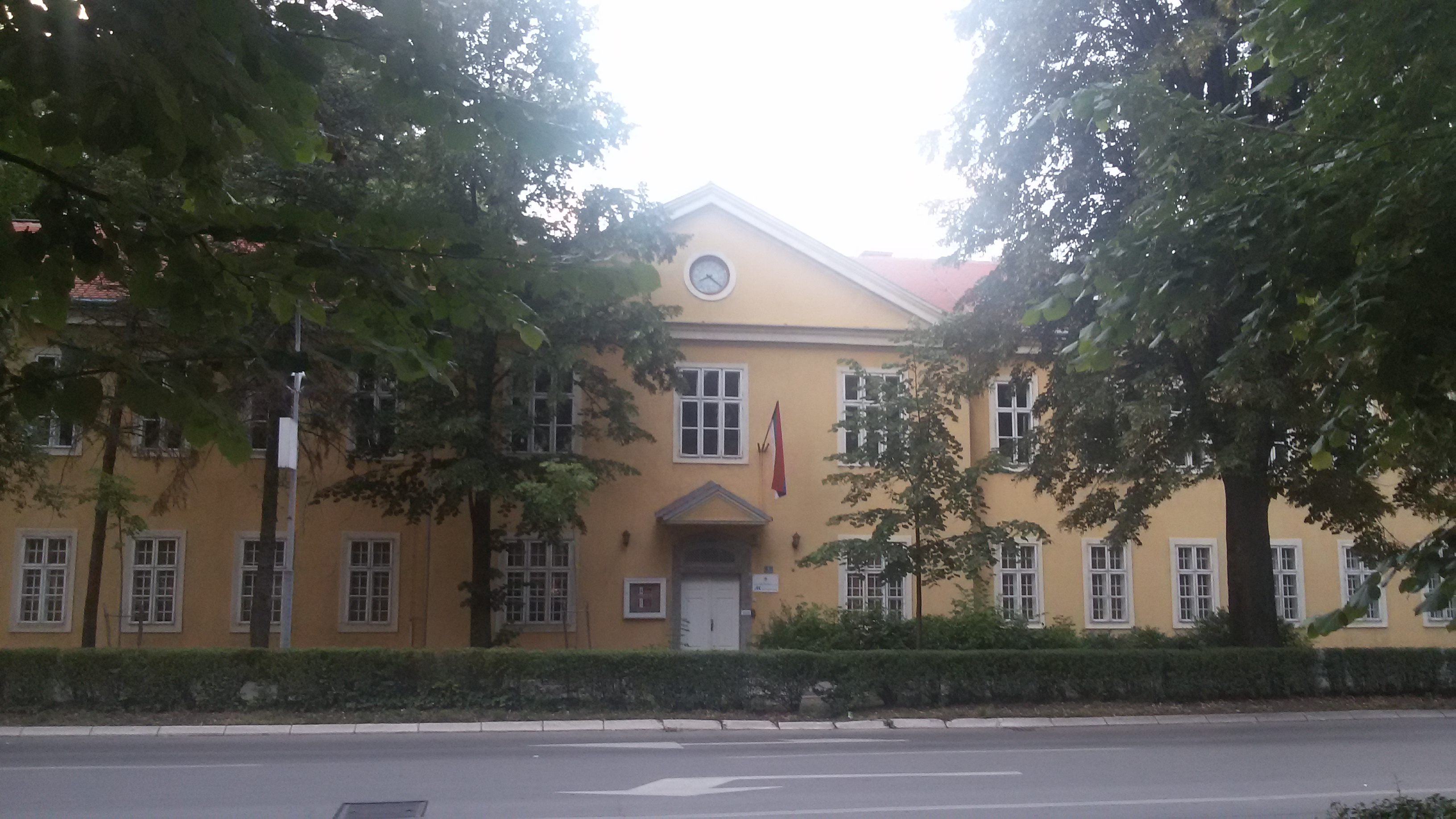 Carska kuća ima danas funkciju arhiva This image was uploaded as part of Trace of Soul 2016.